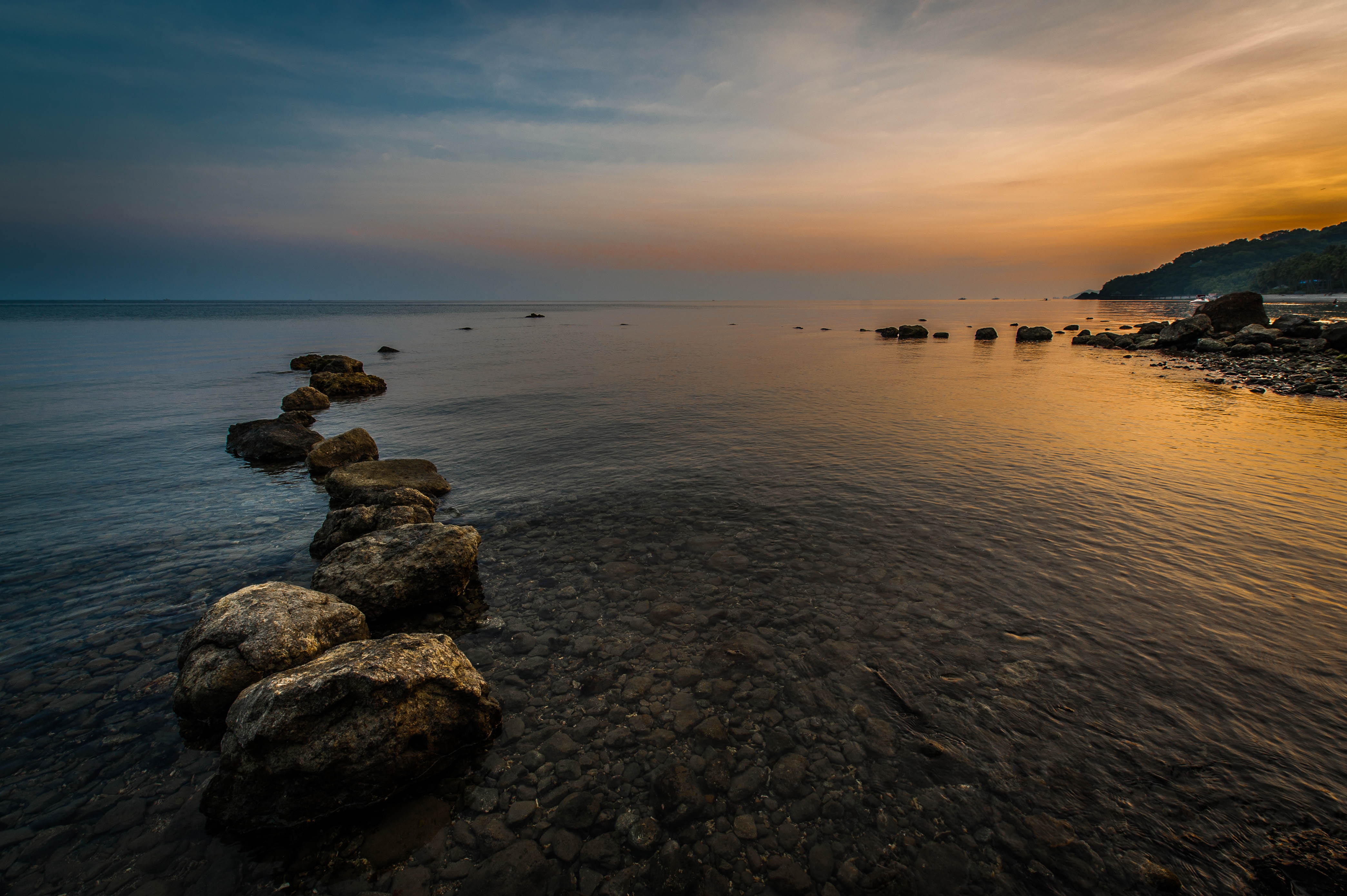 Lobo, Batangas, Philippines